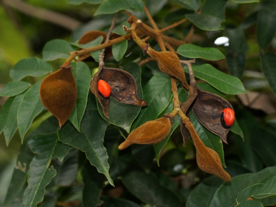 Ormosia monosperma synonyms: Sophora monosperma (basionym), Ormosia dasycarpa In botanic garden the tree is labelled as Ormosia dasycarpa Common Names: Necklace Tree Bead Tree, Snake wood, Caconier, Huayruro (in Spanish) Origin: Caribbean: Trinidad and Tobago; West Indies Northern South America: Venezuela Photographed in Brisbane Botanic Garden (Mt. Coot-tha)